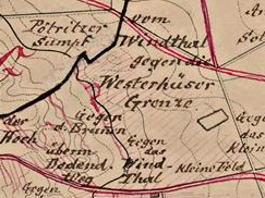 Ausschnitt aus der Flurkarte, Bereich östlich des Frohser Bergs an der Grenze von Schönebeck (Süden) und Westerhüsen (Norden), schwarze Linie ist der Grenzverlauf, Flurname: Gegen den Brunnen